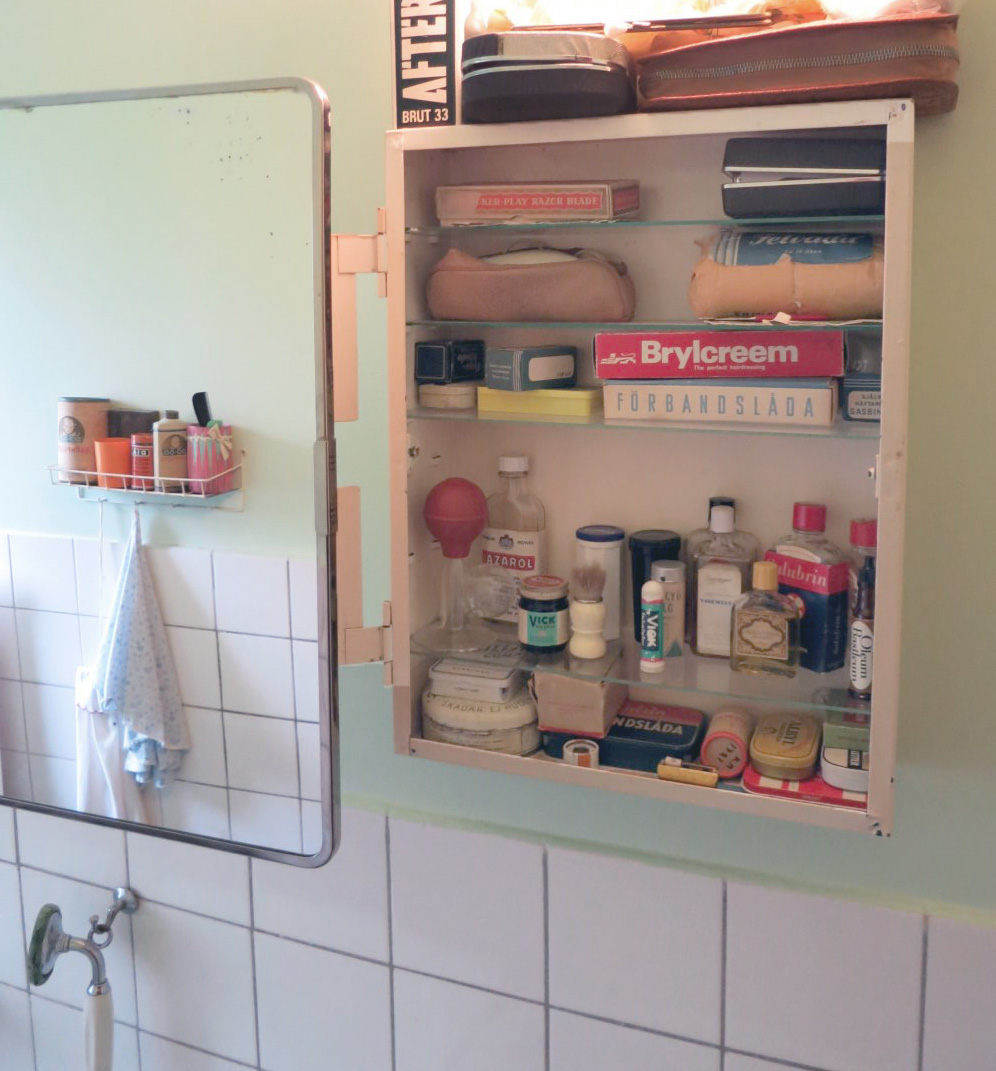 Badrumsskåp på Kortedala museum